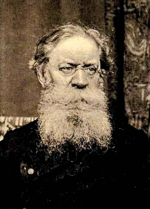 Русский мыслитель-народник, революционер Пётр Лаврович Лавров (1823-1900)